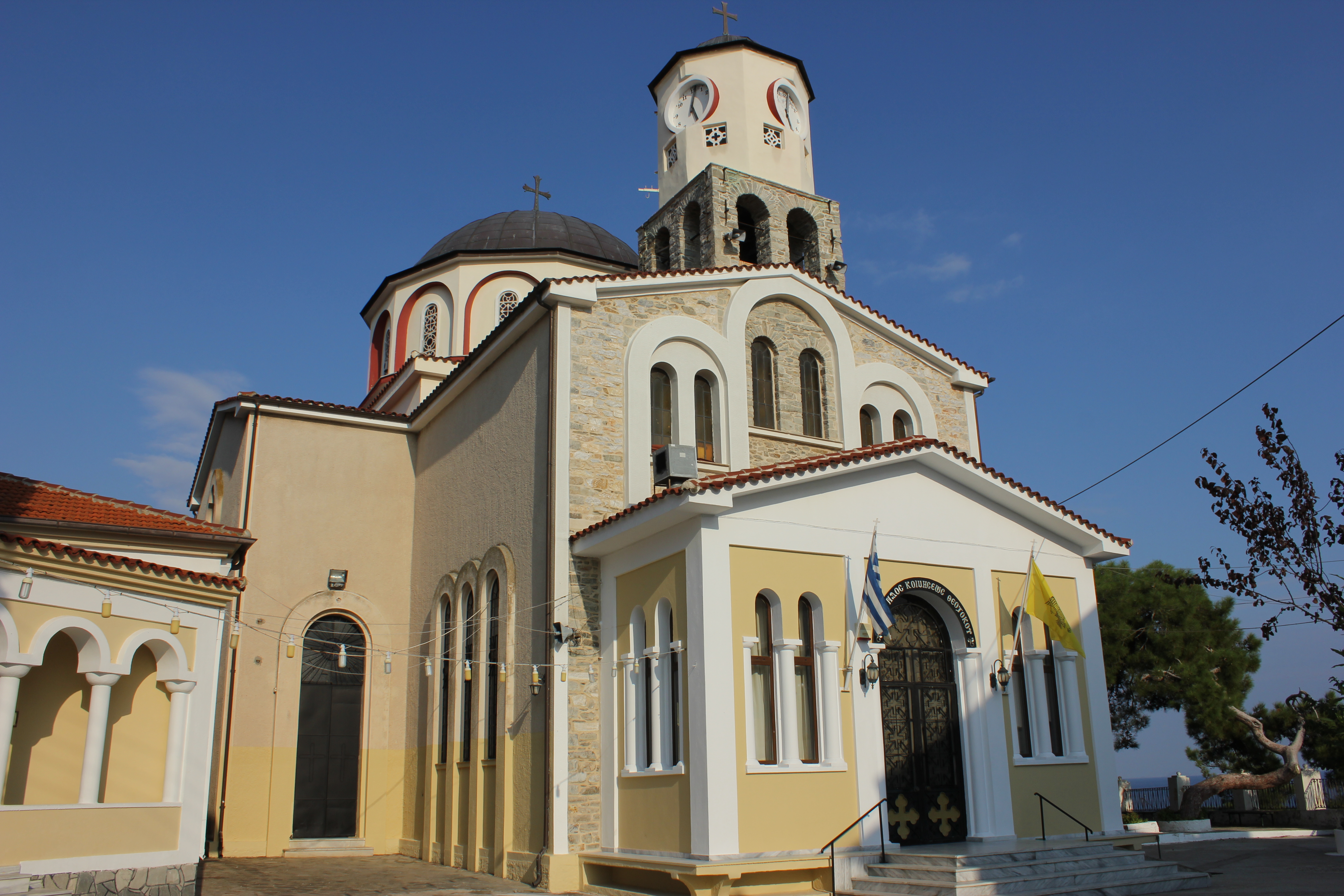 Църква „Успение Богородично, Кавала